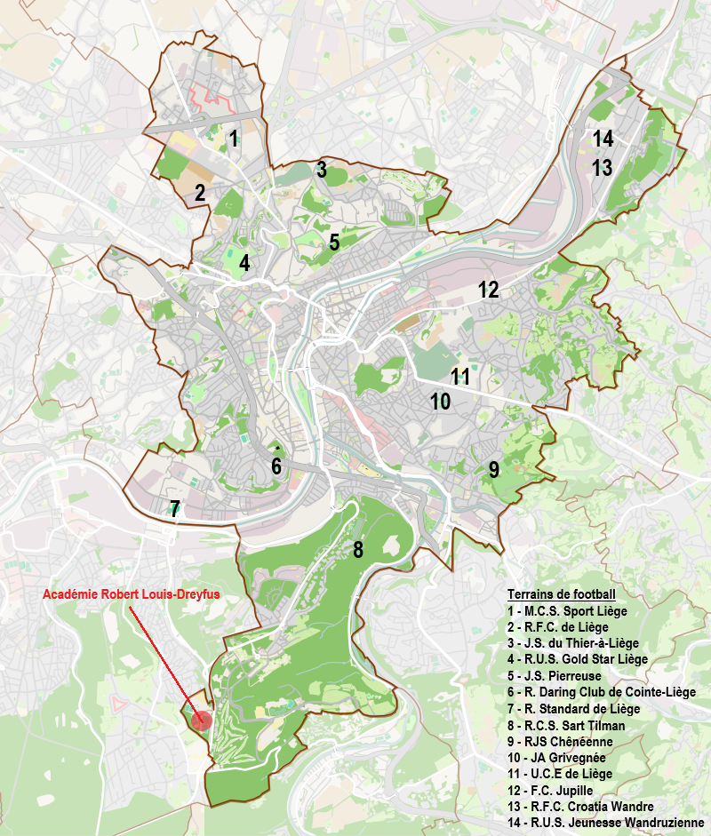 Terrains de football à Liège en 2020.